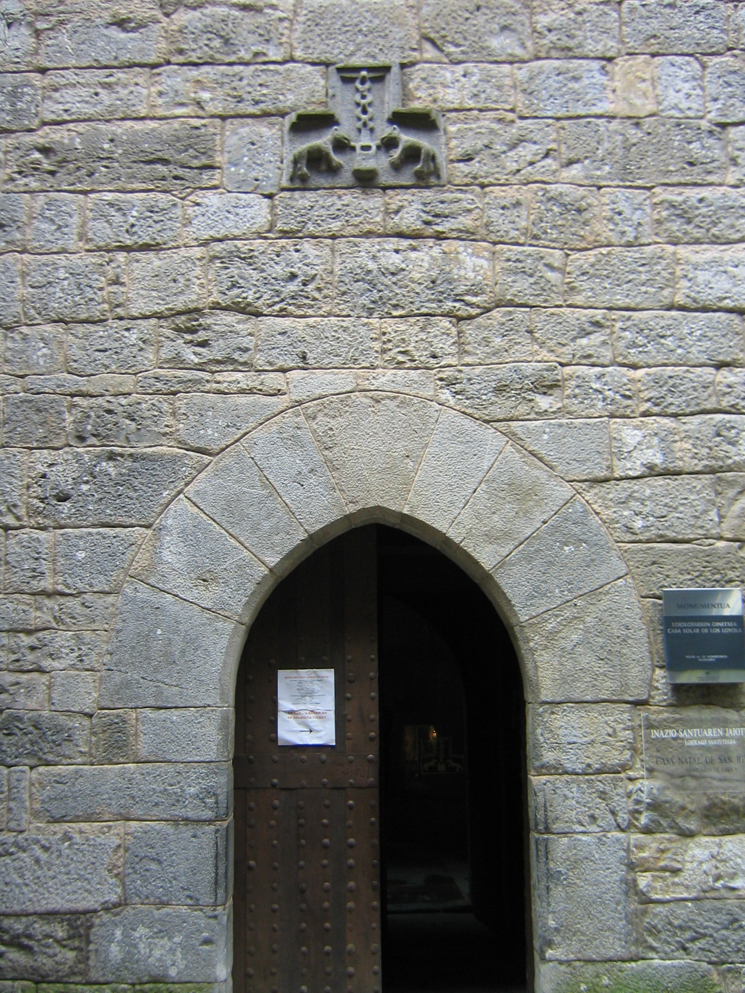 Casa Santa puerta de entrada con el escudo de Loyola. Santuario de Loiola, Azpeitia. Guipúzcoa, País Vasco (España).